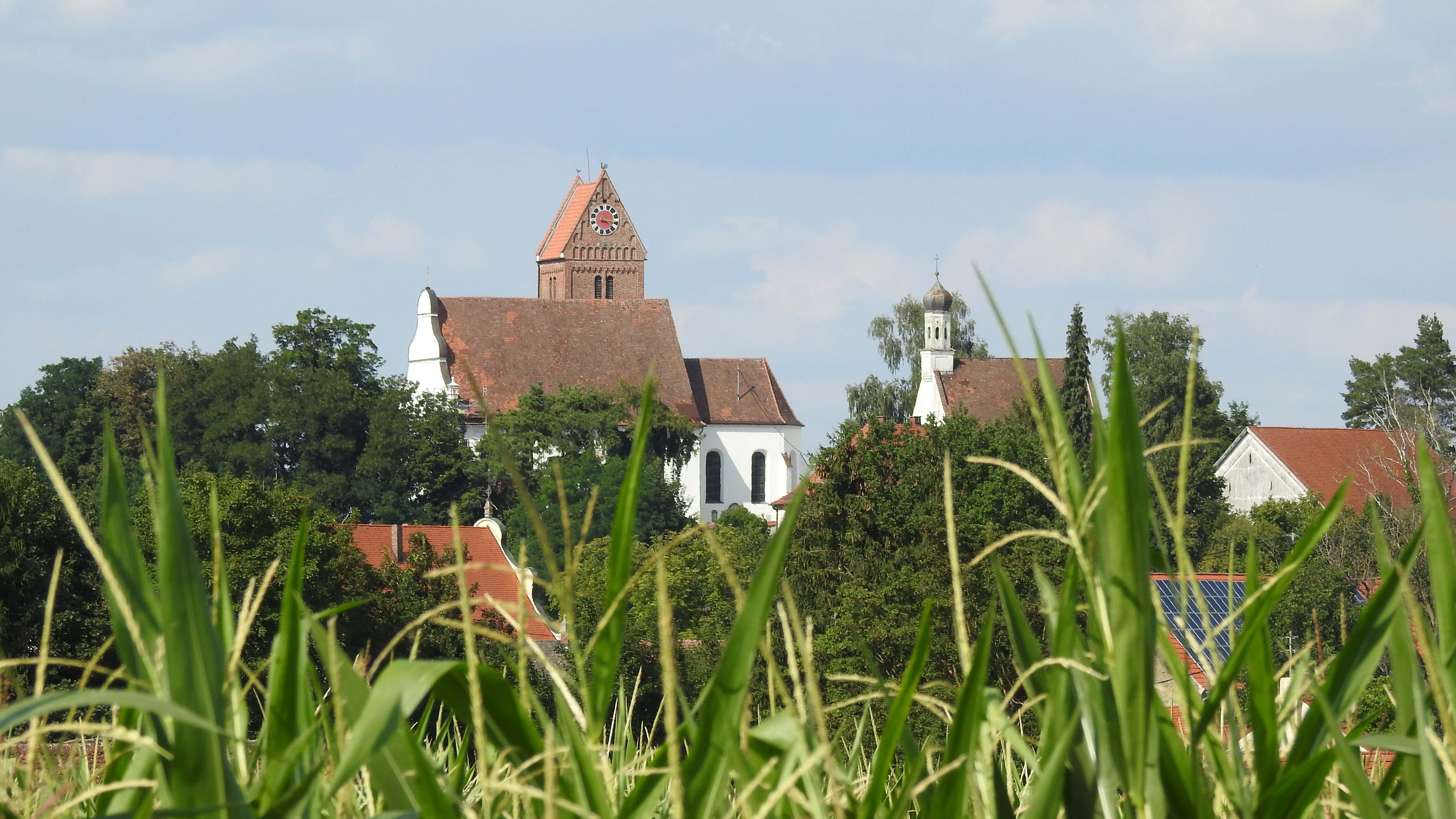 Kirchberg Gempfing von Süden, Rain (Lech)